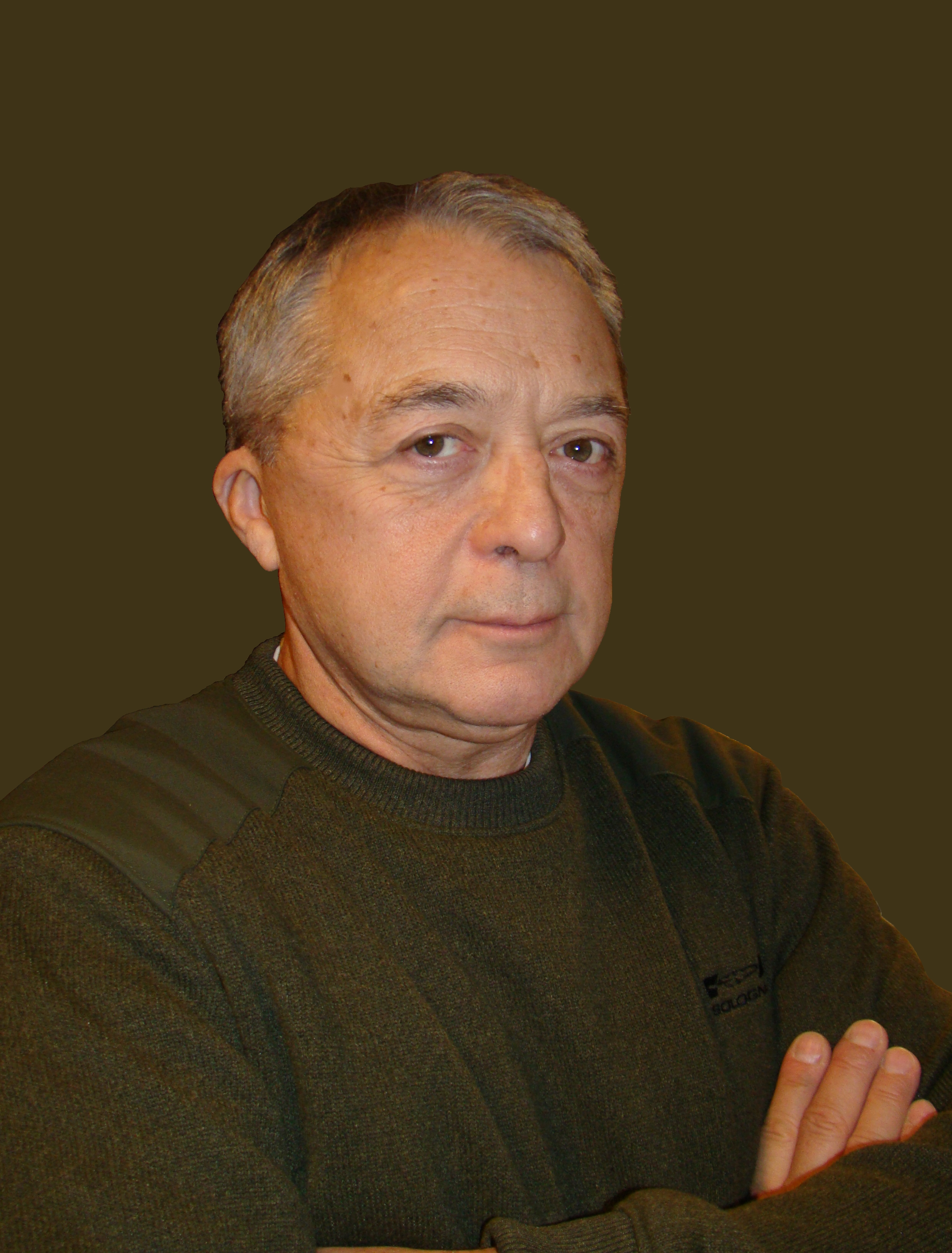 Marcel Otte, préhistorien et paléoanthropologue, professeur à l'Université de Liège, Belgique.